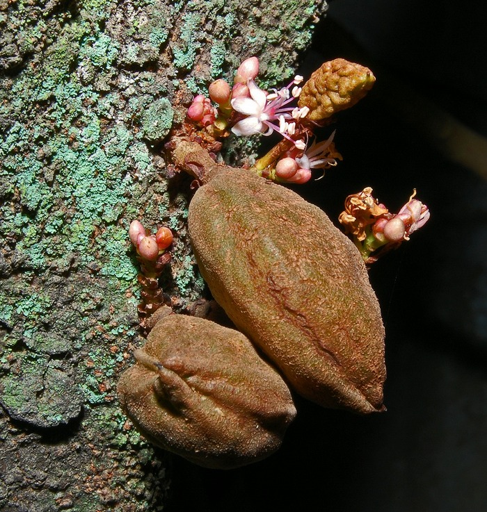 Cynometra cauliflora inflorescence. Bogor, West Java, Indonesia